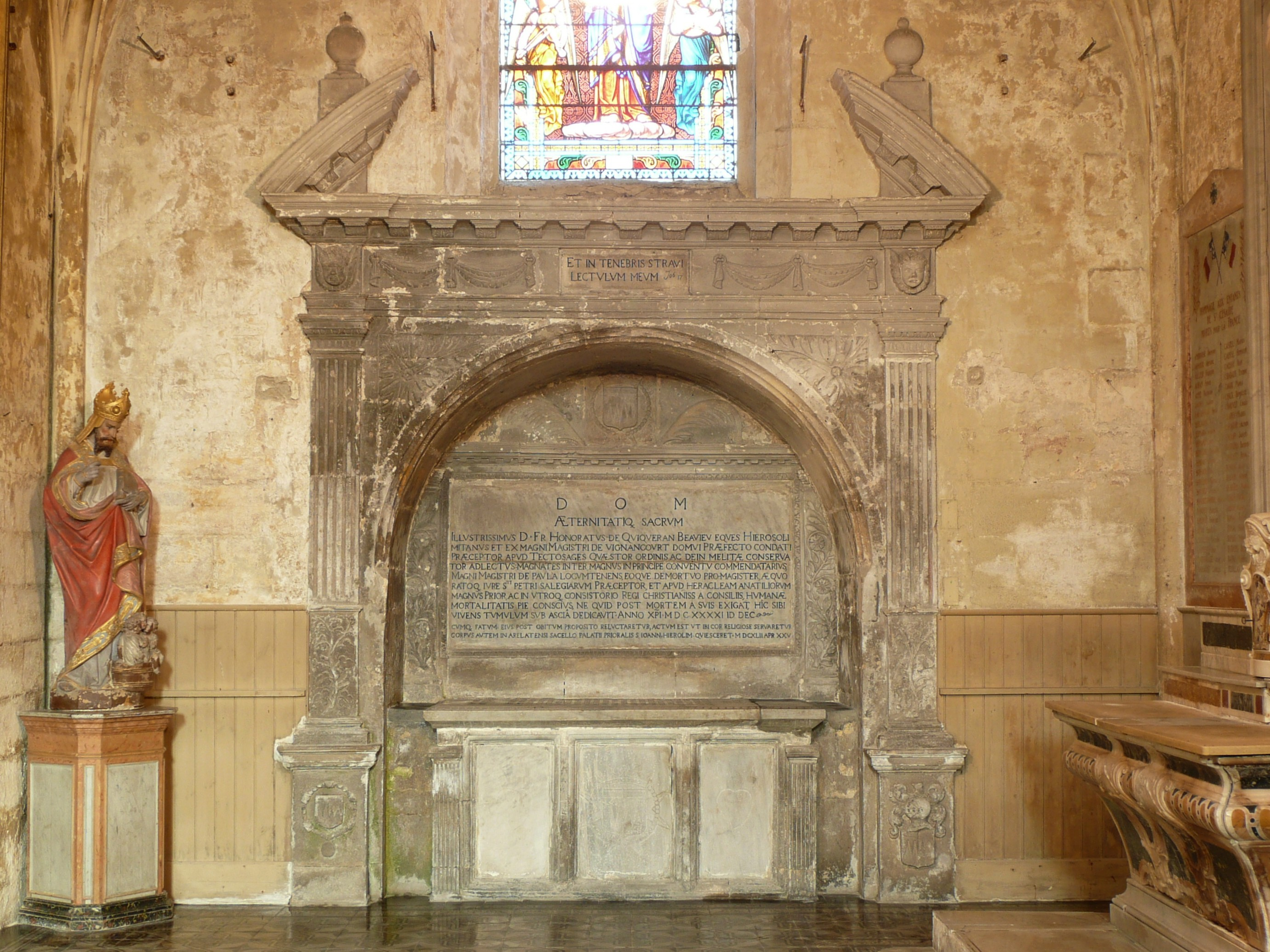 Arles (Bouches-du-Rhône, France), église St Césaire dans le quartier de la Roquette, ancienne église conventuelle des Grands-Augustins, commencée en 1258, remaniée à plusieurs reprises au cours des siècles, seule paroisse de ce quartier et troisième église de la ville ancienne encore utilisée. Dans la chapelle du Sacré-Cœur, mausolée où repose le cœur d'Honoré Quiqueran de Beaujeu, chevalier de l'ordre de St Jean de Jérusalem, commandeur des commanderies de St Pierre de Salliers et de Condat, grand prieur de St Gilles, conseiller du roi en ses conseils d'État et privé, dont le corps est inhumé dans la chapelle saint Jean du grand prieuré de l'ordre de Malte, aujourd'hui siège du musée Réattu.